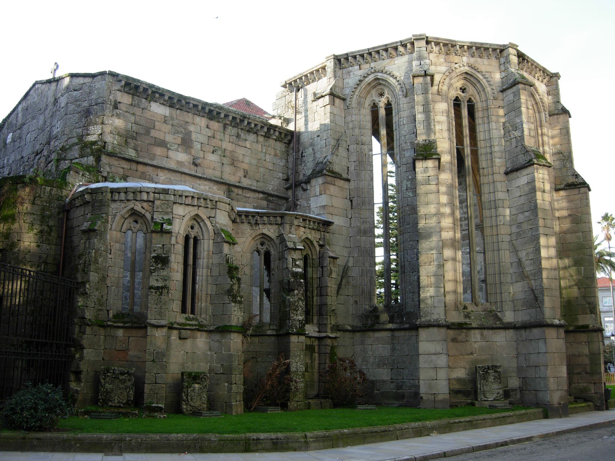 Mosteiro de Santo Domingo. Los dominicos llegaron a Pontevedra a finales del S. XII y comenzaron la construcción de ese templo gótico en el siglo XIII. En el Siglo XVIII intentaron una reconstrucción del estilo neoclásico, pero quedo sin concluir, como también quedó sin concluir el derribo del ábside gótico de la primera iglesia. Se conserva la cabecera de la iglesia con cinco ábsides poligonales y un muro lateral con una pequeña portada y rosetón. Alberga la sección de Arqueología del Museo de Pontevedra y la exposición de estelas romanas, capiteles visigóticos, sepulcros medievales ...